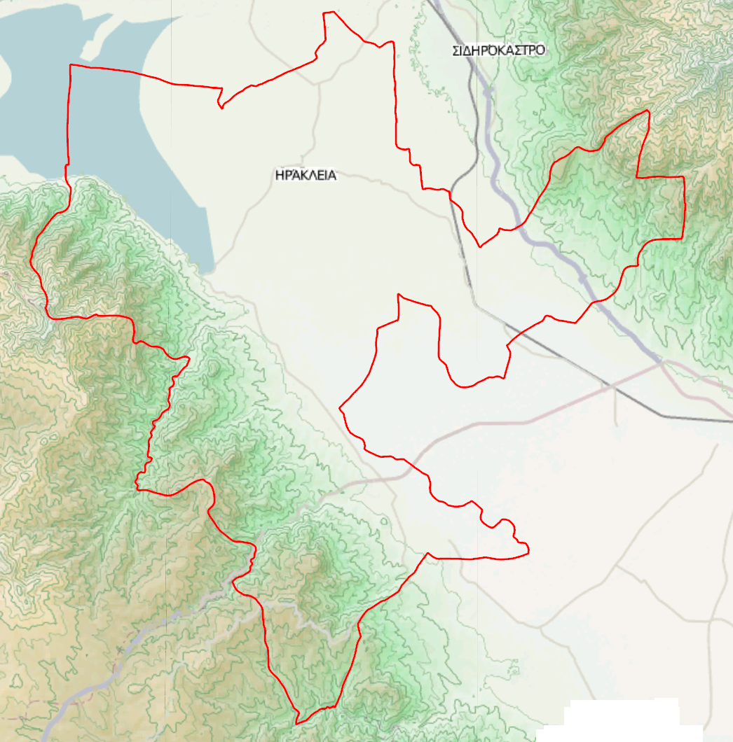 Τοπογραφικός χάρτης του Δήμου Ηράκλειας